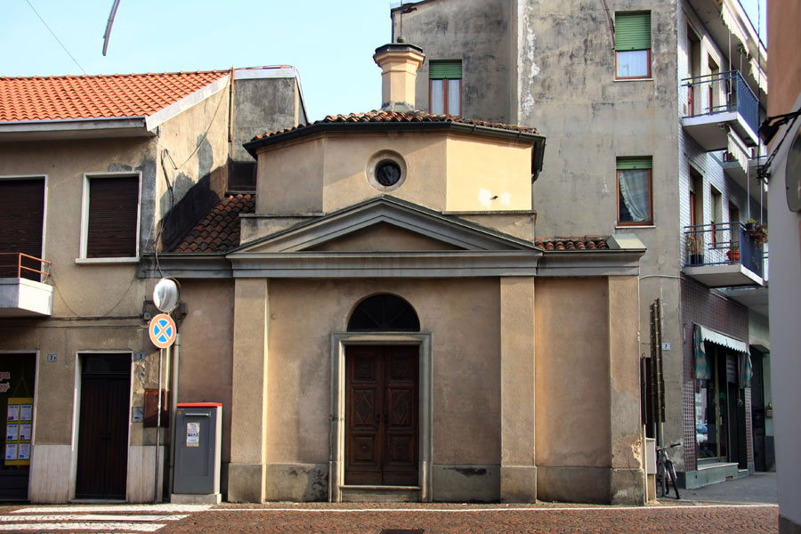 Oratorio di San Rocco a Cameri